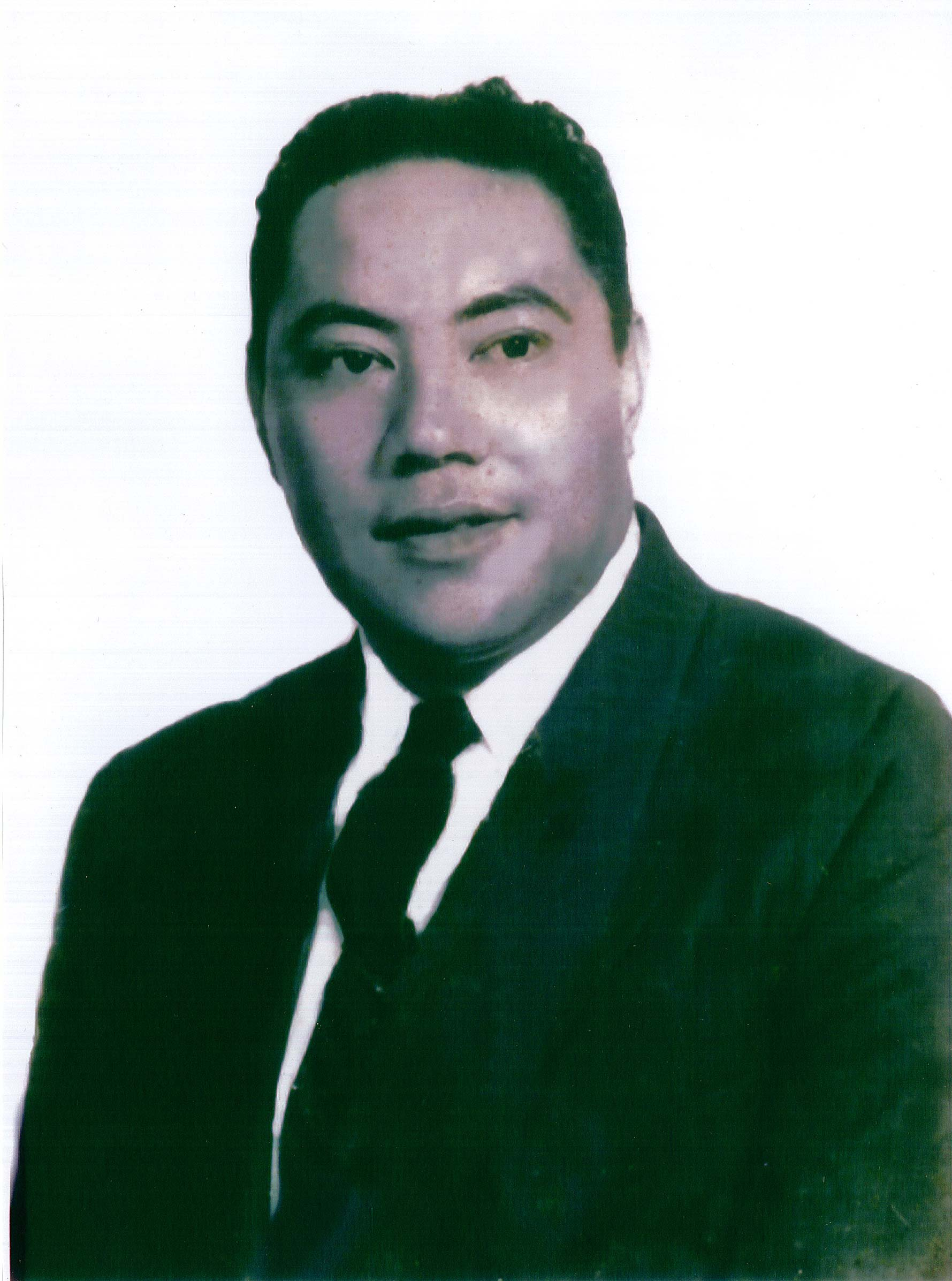 Lea faka-Tonga: no original description